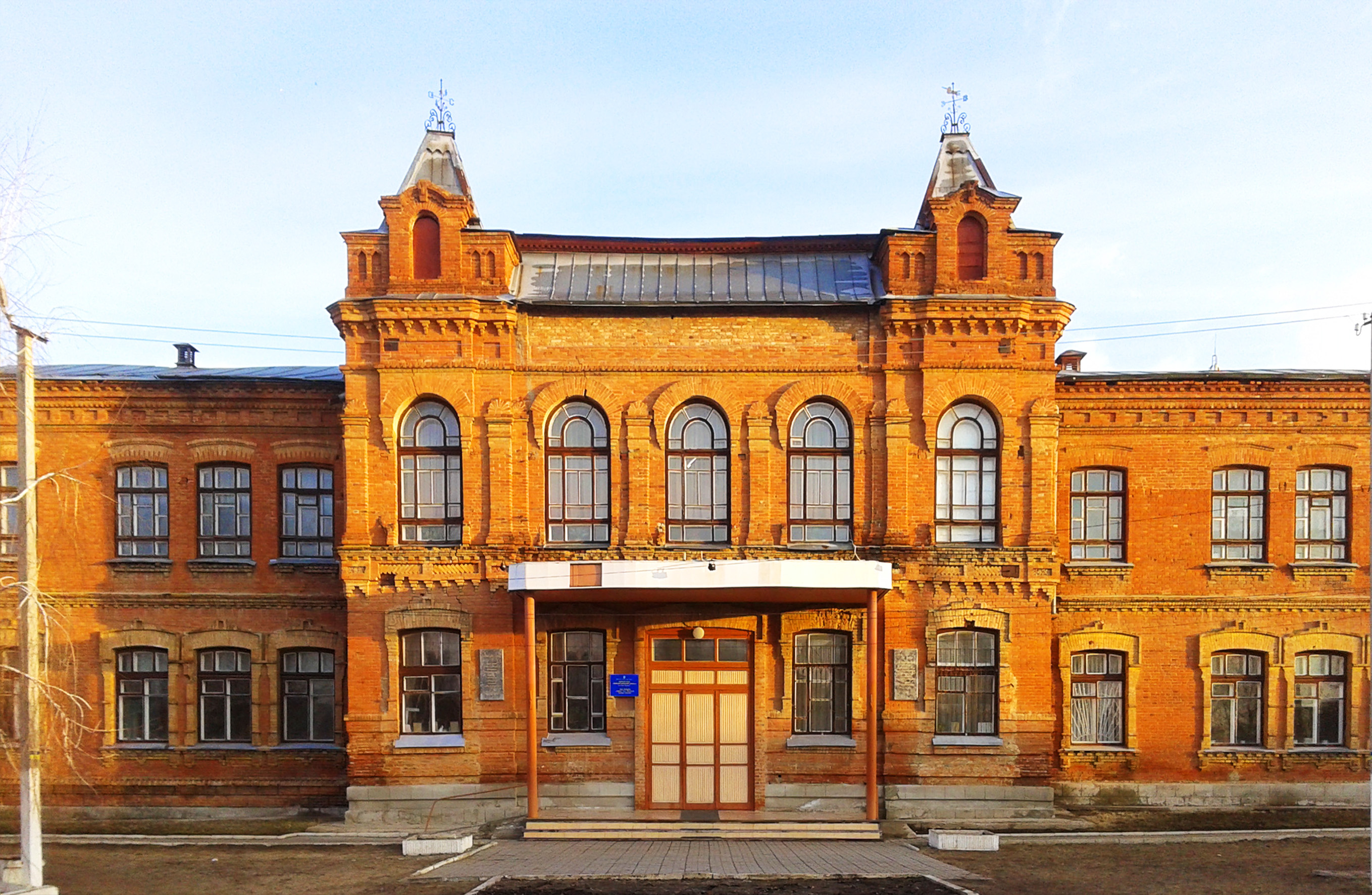 Катерининська жіноча гімназія (поч. ХХ ст.), Старобільський державний учительський інститут (1940-1954), Старобільський факультет Луганського національного університету імені Тараса Шевченка